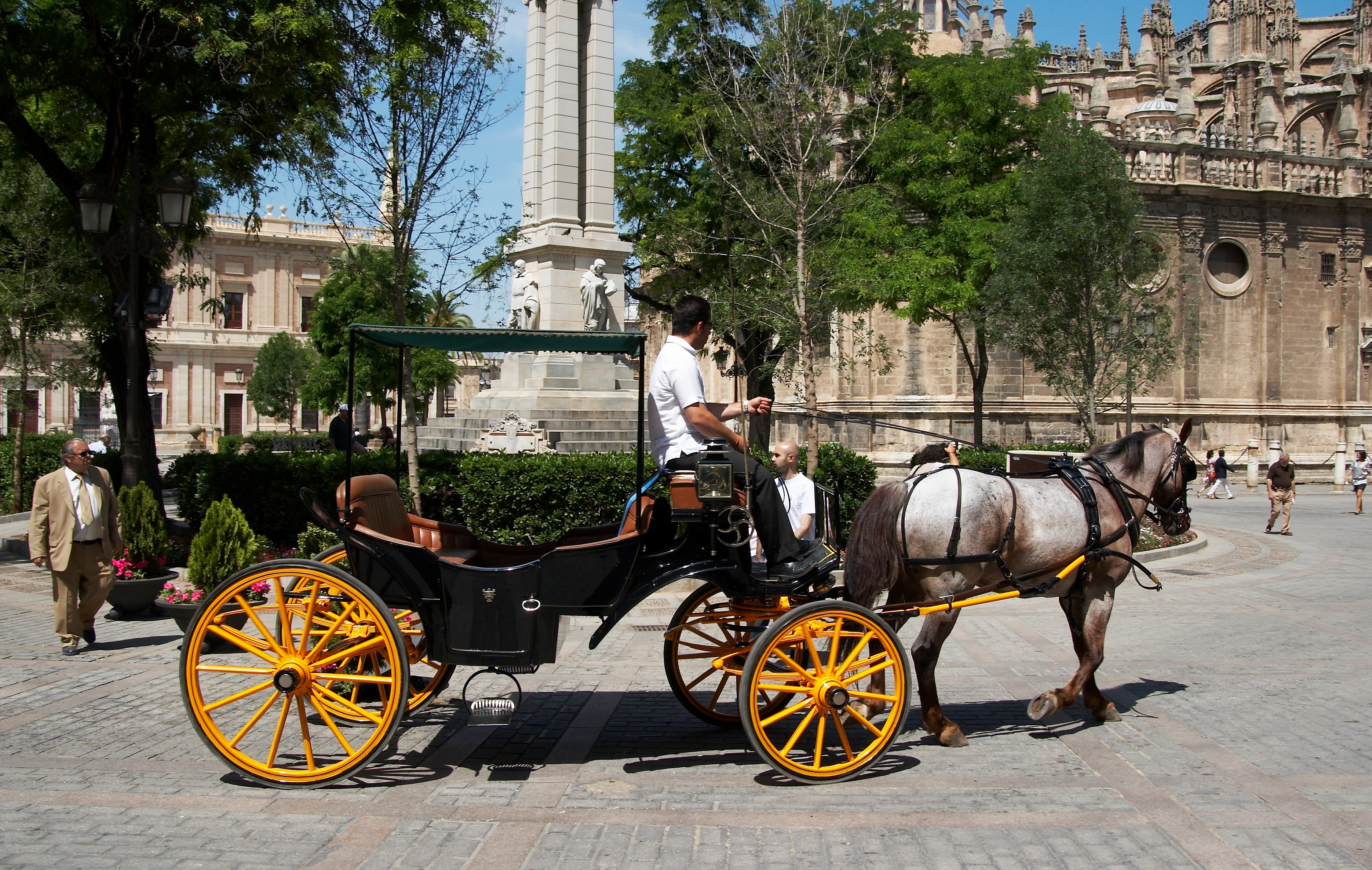 Coche de Caballos, Plaza del Triunfo, Sevilla, España.